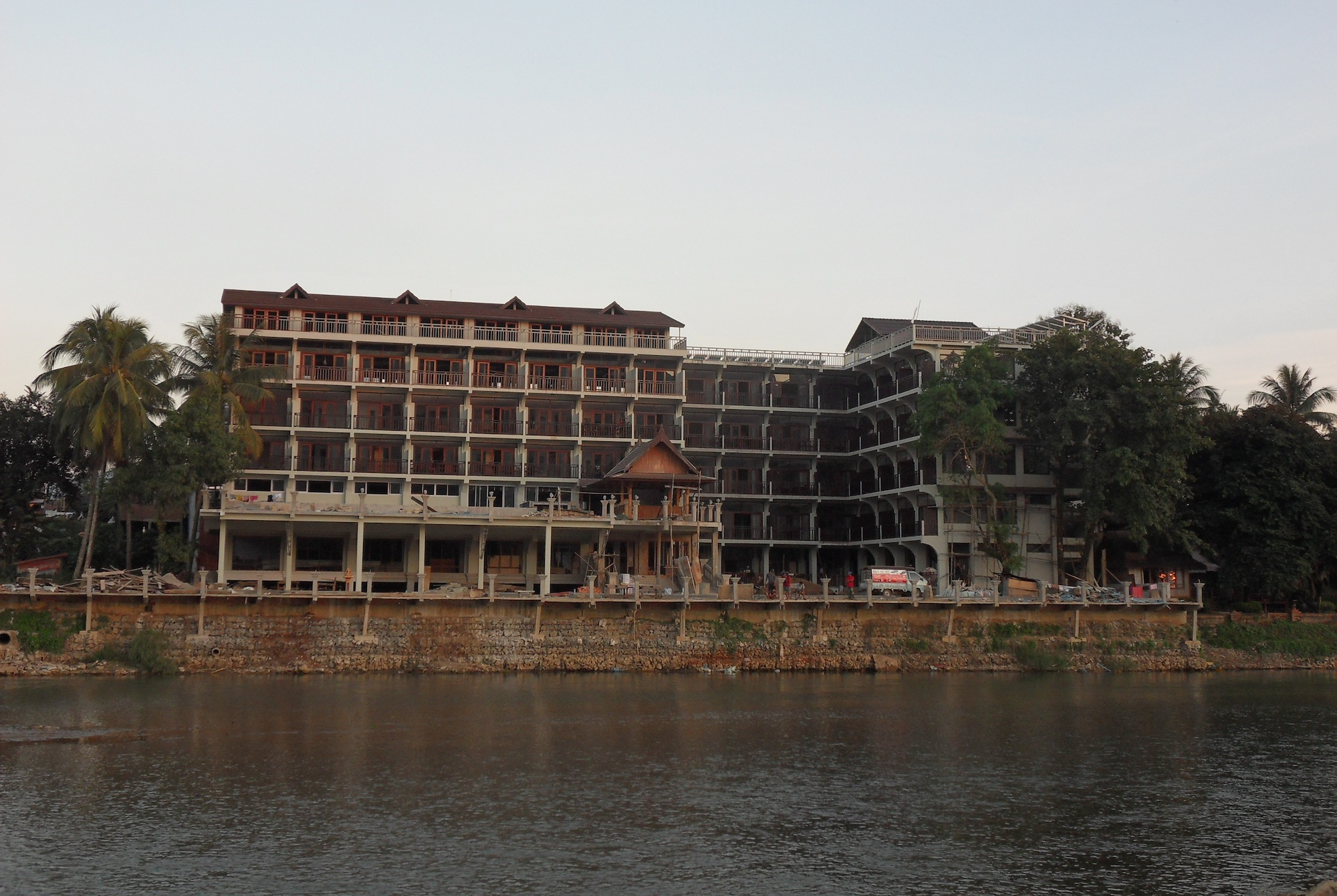 Expansion en cours de construction de l'hôtel Elephant Crossing à Vang Vieng. La Nam Song est au premier plan.